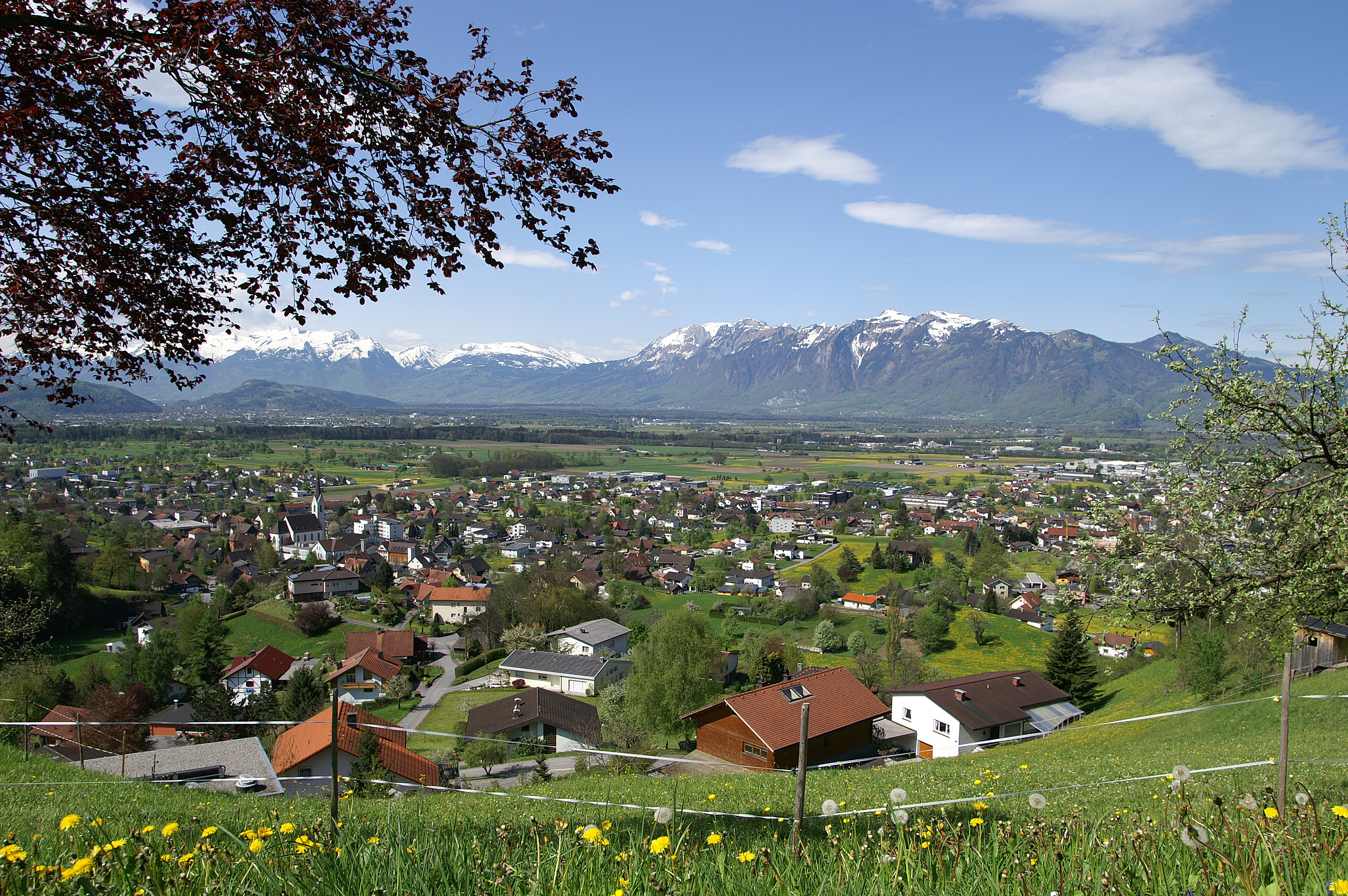 Weiler in Vorarlberg. Gesehen vom Ortsteil Halden; Blick über das Rheintal zu den Schweizer Bergen des Alpsteins.